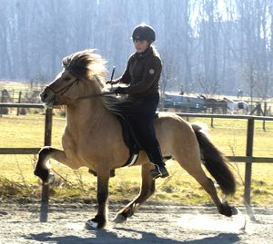 Islandpferd im Tölt